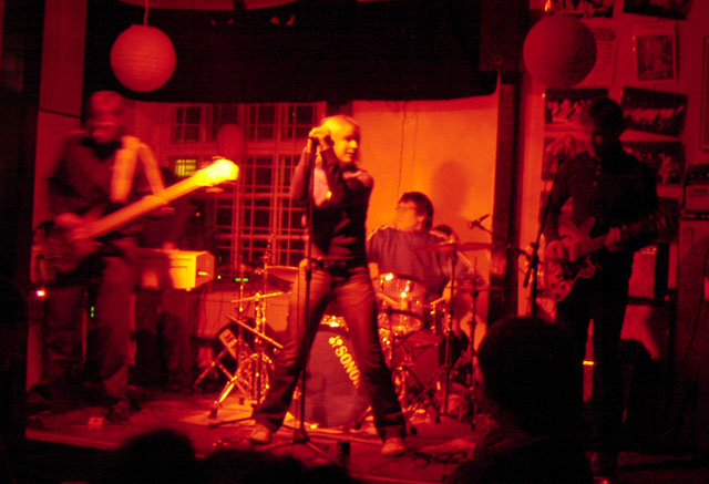 Foto: Privat